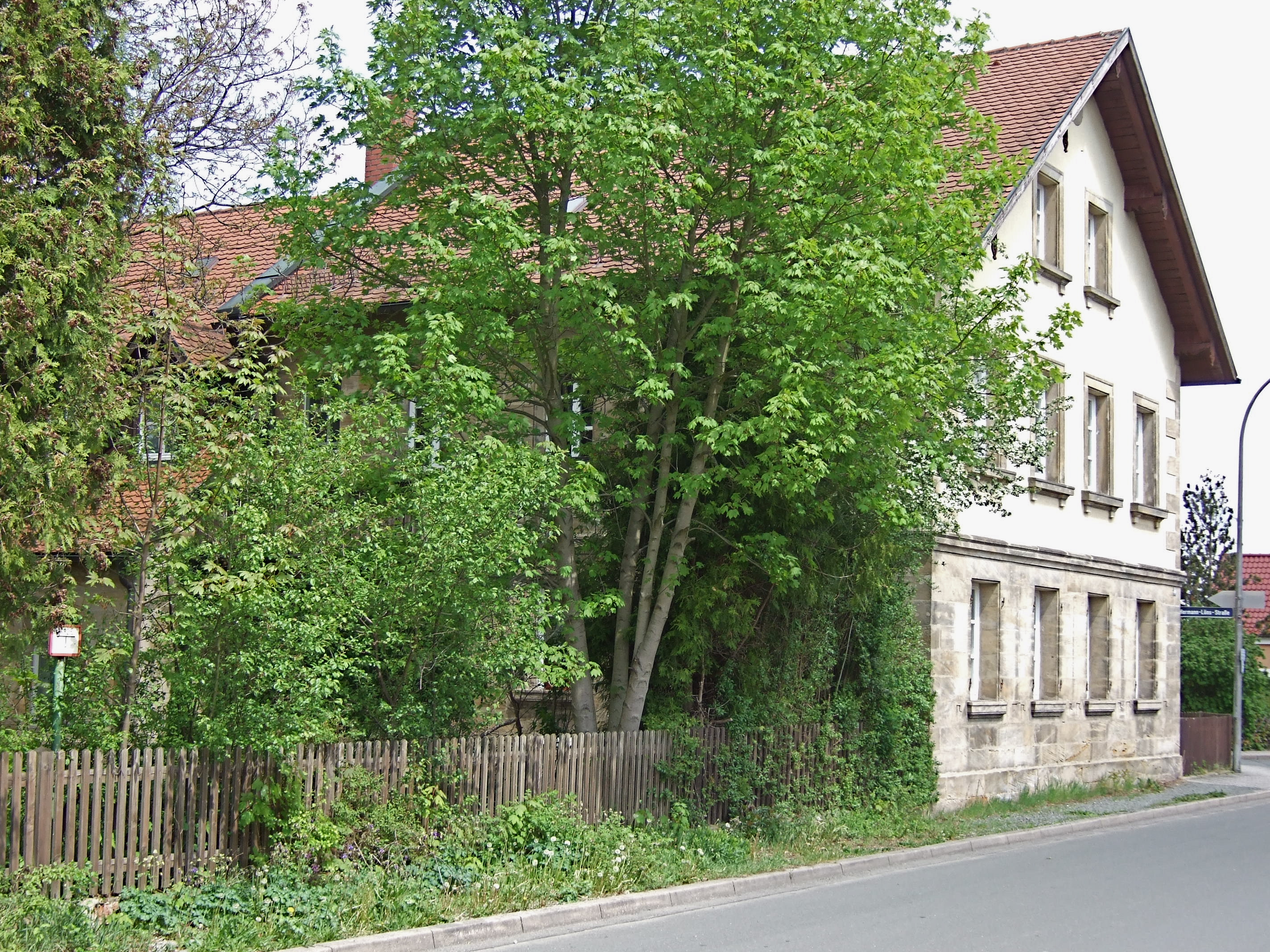 Altes Haus in Lerchenbühl (Saas), Glockenstrasse